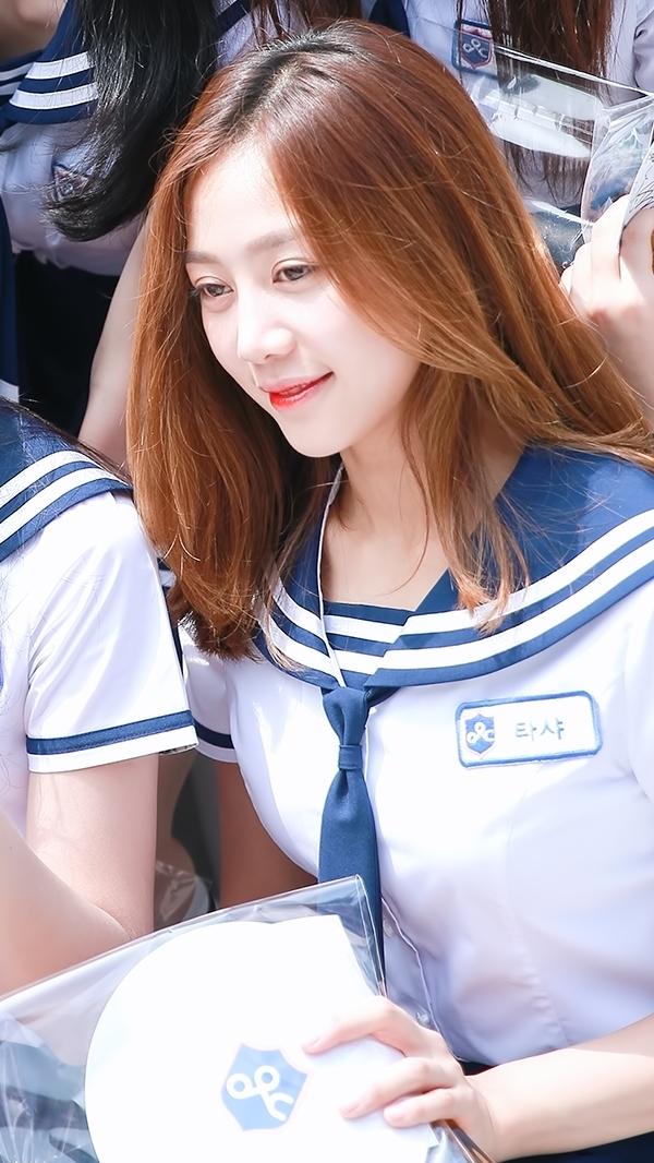 170712 홍대 아이돌학교